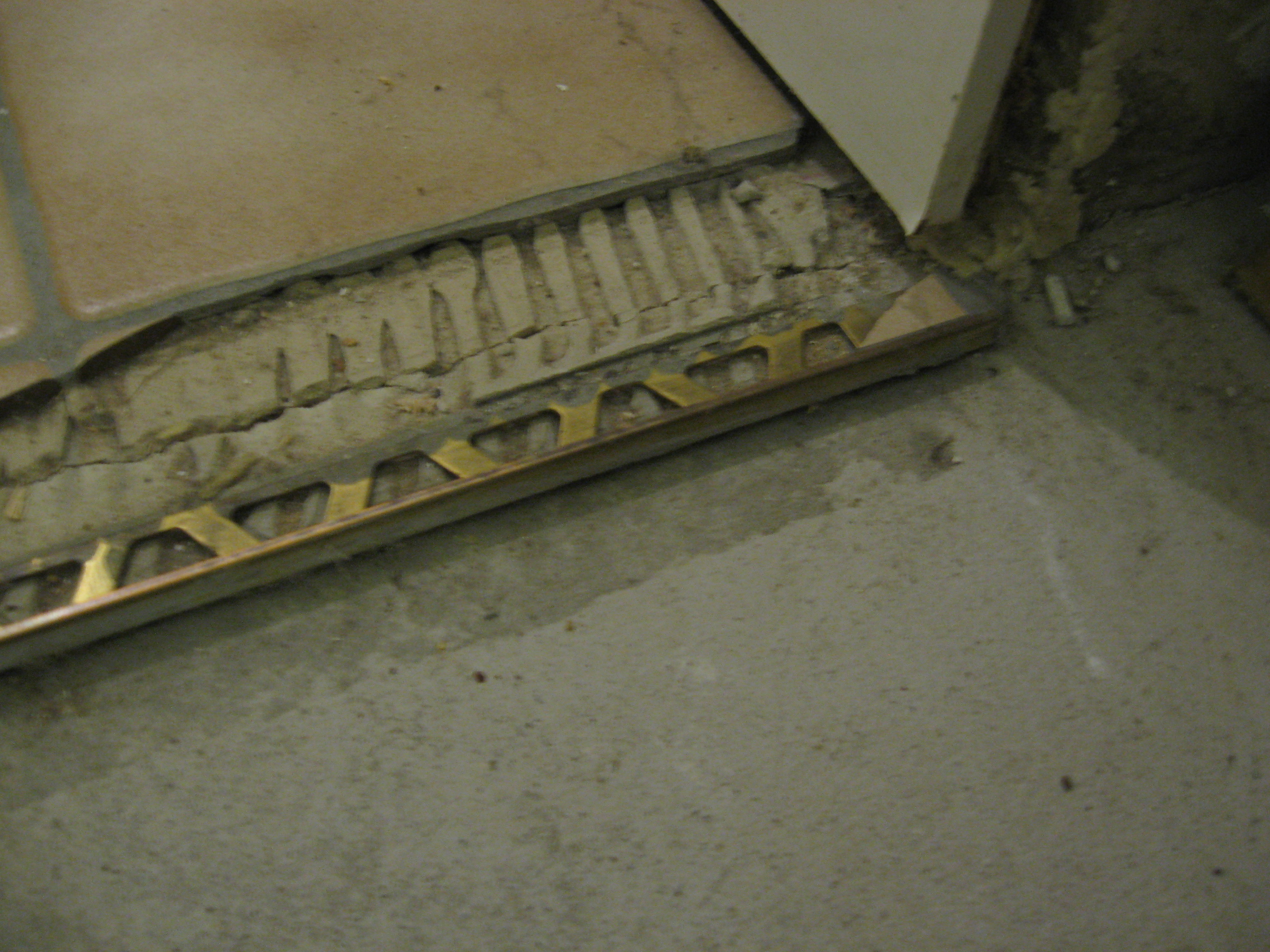 Schlueterschiene - fehlerhaft eingebaut